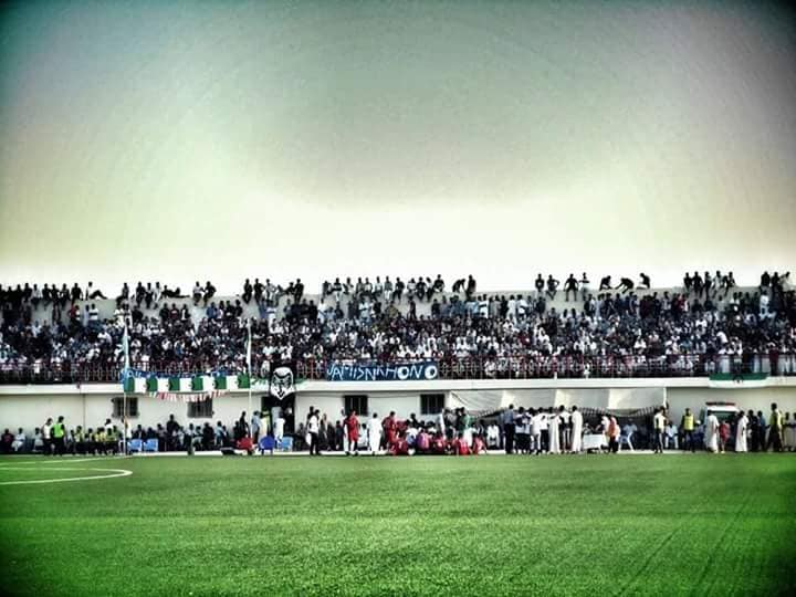 صورة تمثل ملعب وجمهور اتحاد الدوسن